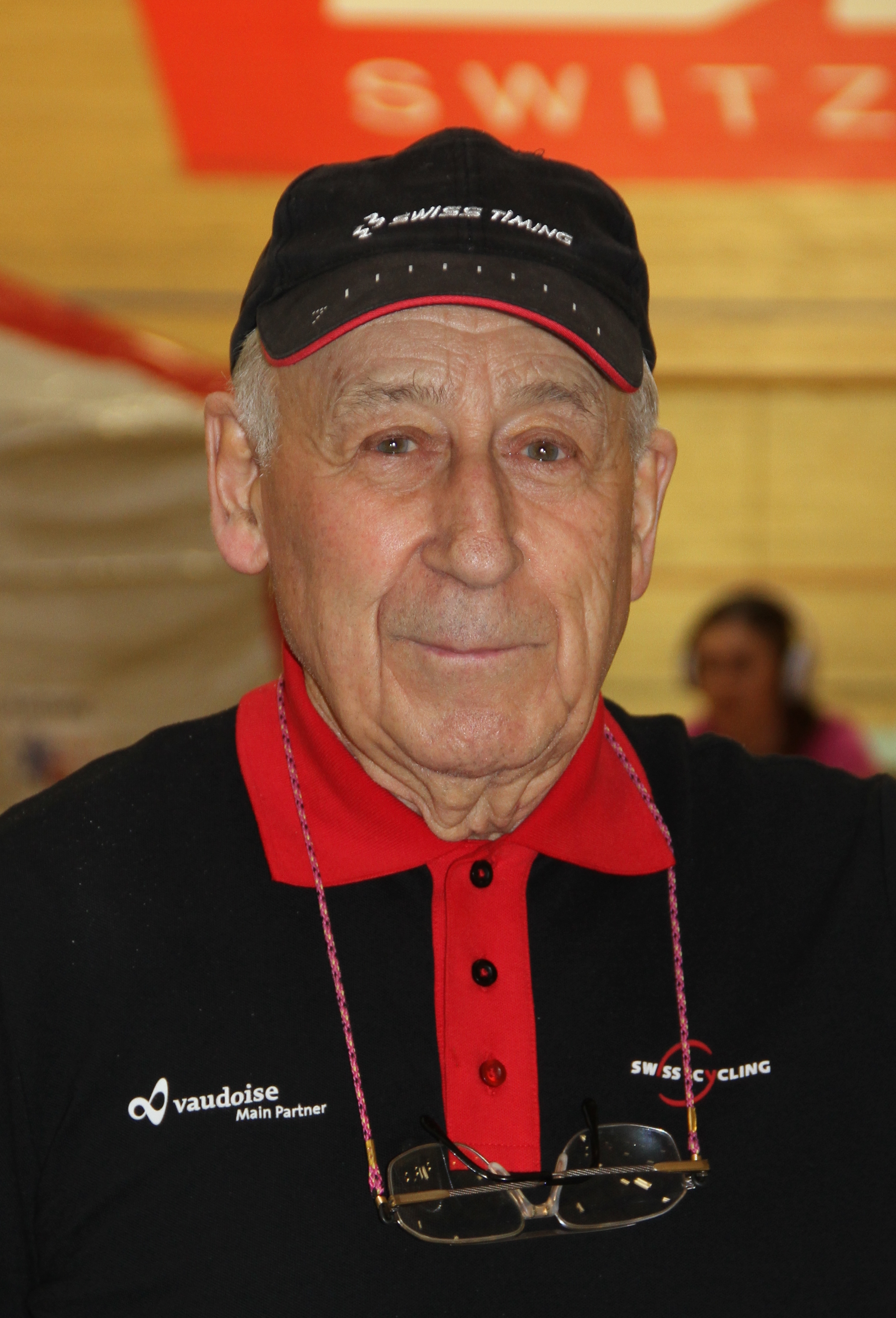 Fritz Brühlmann, Mechaniker der Schweizer Radsport-Nationalmannschaft The making of this document was supported by the Community-Budget of Wikimedia Germany.